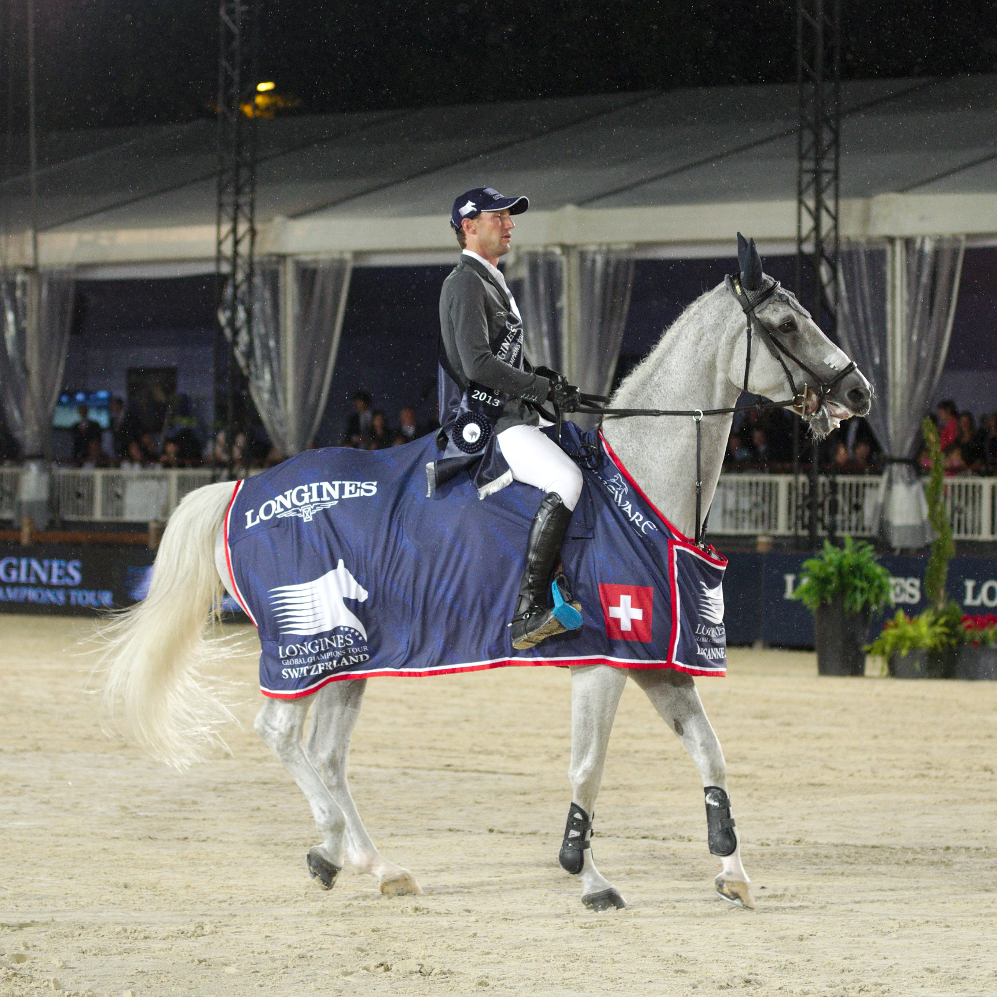 2013 Longines Global Champions - Lausanne - 14-09-2013 - Kevin Staut et Silvana HDC